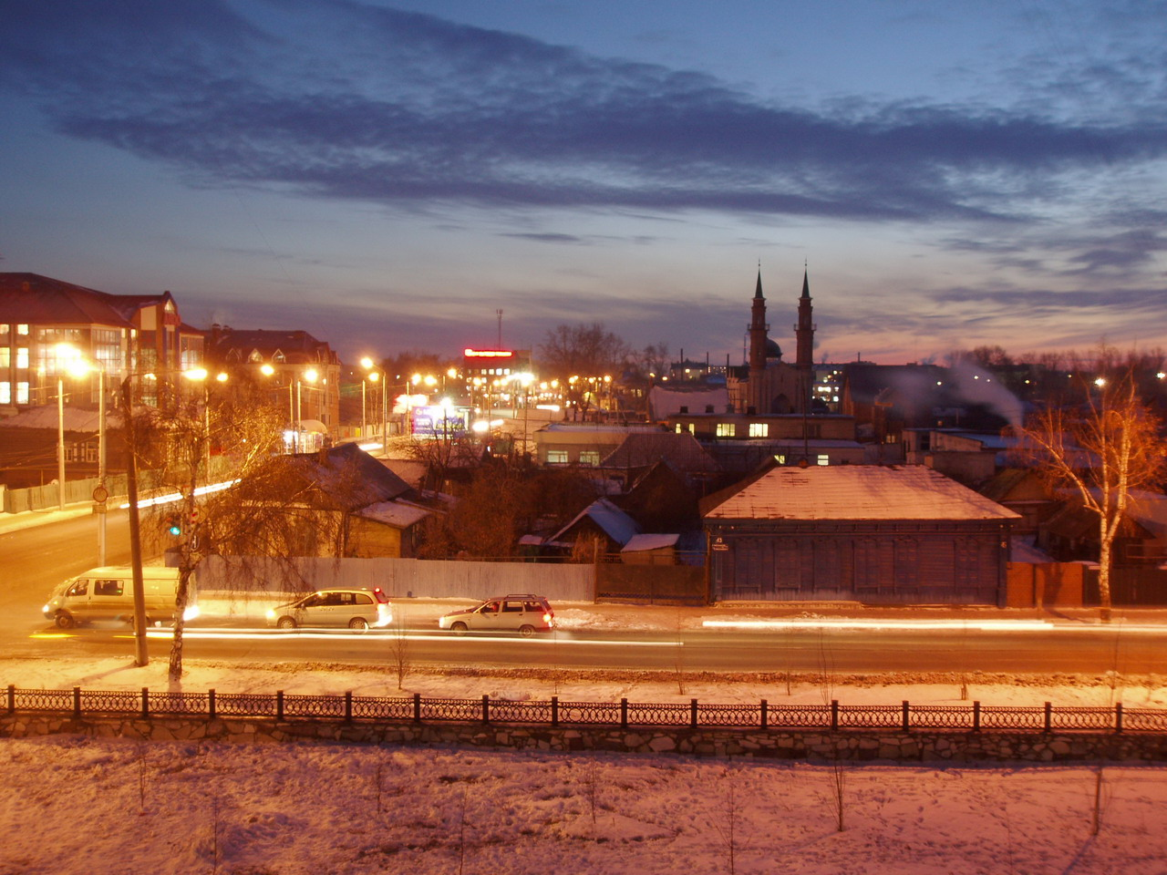 перекресток ул.Мира и ул.Богдана Хмельницкого вечером